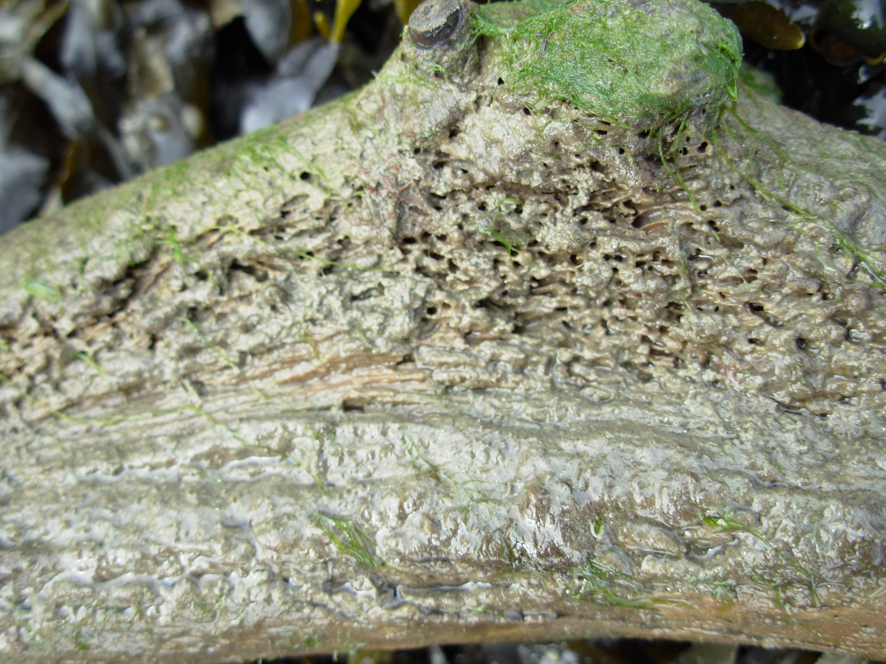 Morceau de bois rongé par Limnoria.